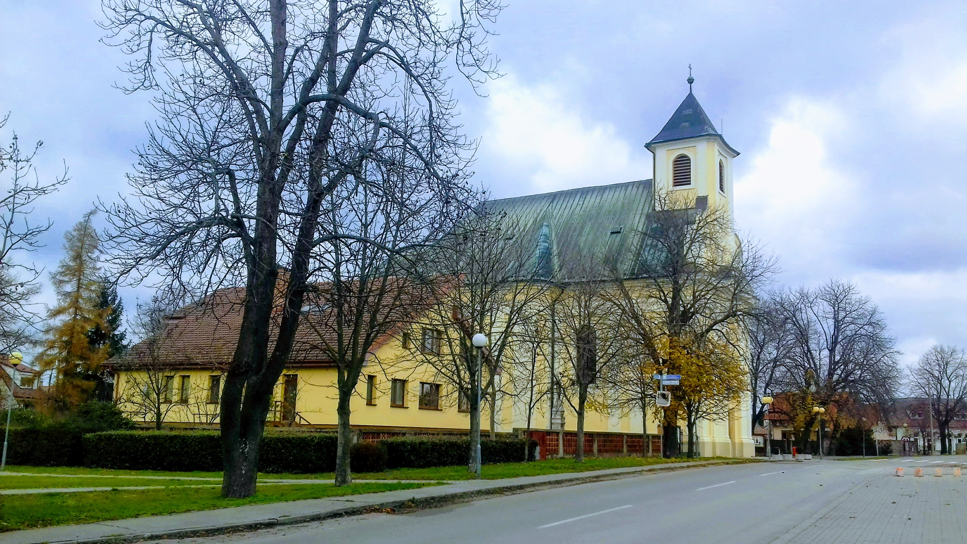 Dénesd, római katolikus plébániatemplom